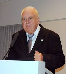 dr Rolf Massin lors d'un discours